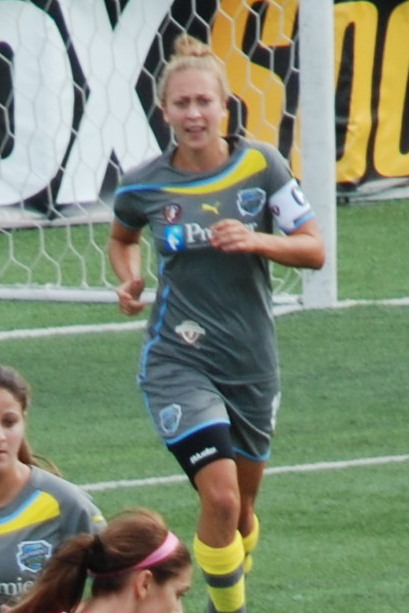 Nikki Krzysik (Philadelphia Independence)